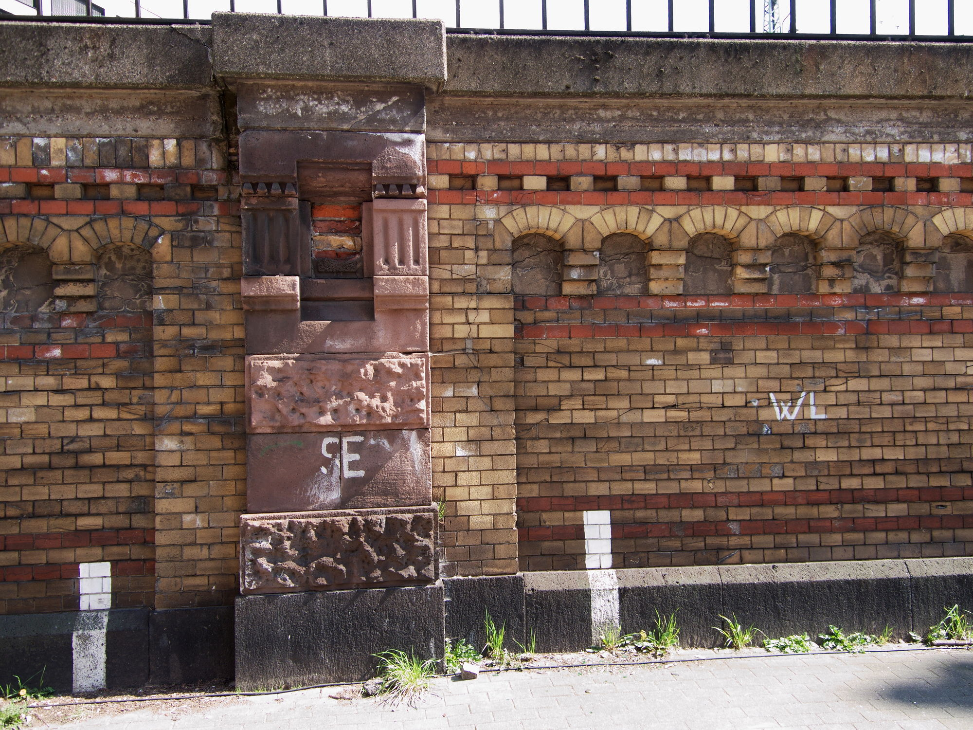 gemauerte Stütze der Hamburger Pfeilerbahn hinter der Markthalle